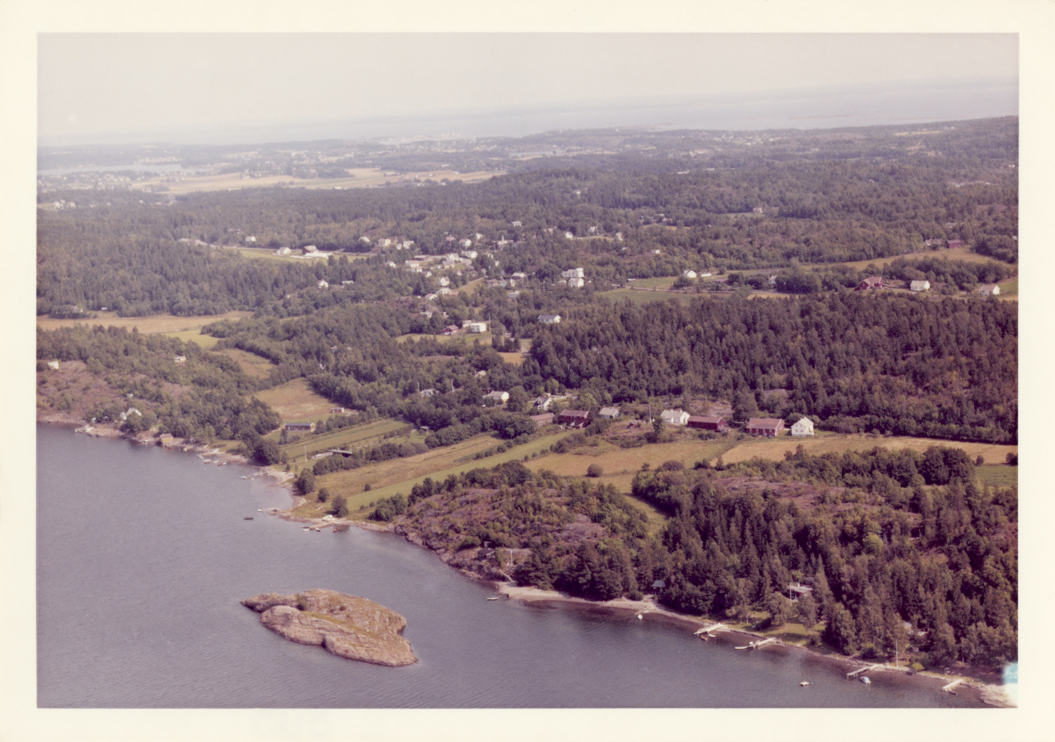 WF.S.188516 I bildet ser vi følgende gårder i forgrunnen: Skovmark gård, gnr/bnr 91/6 Skjønhøi gård, gnr/bnr 91/47 Og i bakgrunnen til høyre i bildet: Horperød gård gnr/bnr 91/1 Solhøi gård gnr/bnr 91/35 Grøtterødskjær biotopvern, Grøtterødskjær er vernet etter viltloven, med vern av hekkende sjøfugl. her er det ferdselsforbud mellom 15. april og 15. juli. Holmen har sågar sin egen forskrift